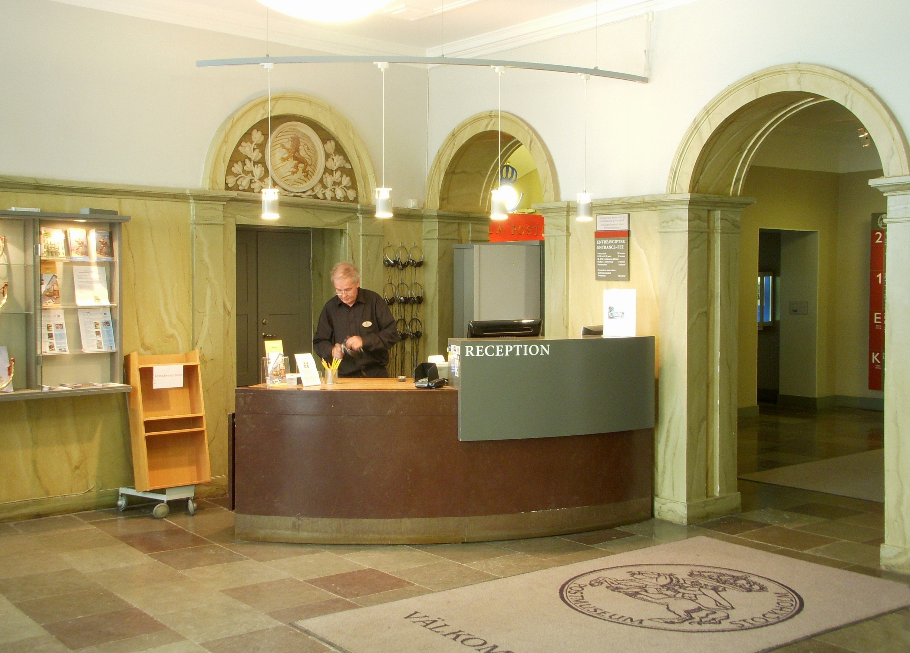 Entréhallen till Postmuseum i Stockholm